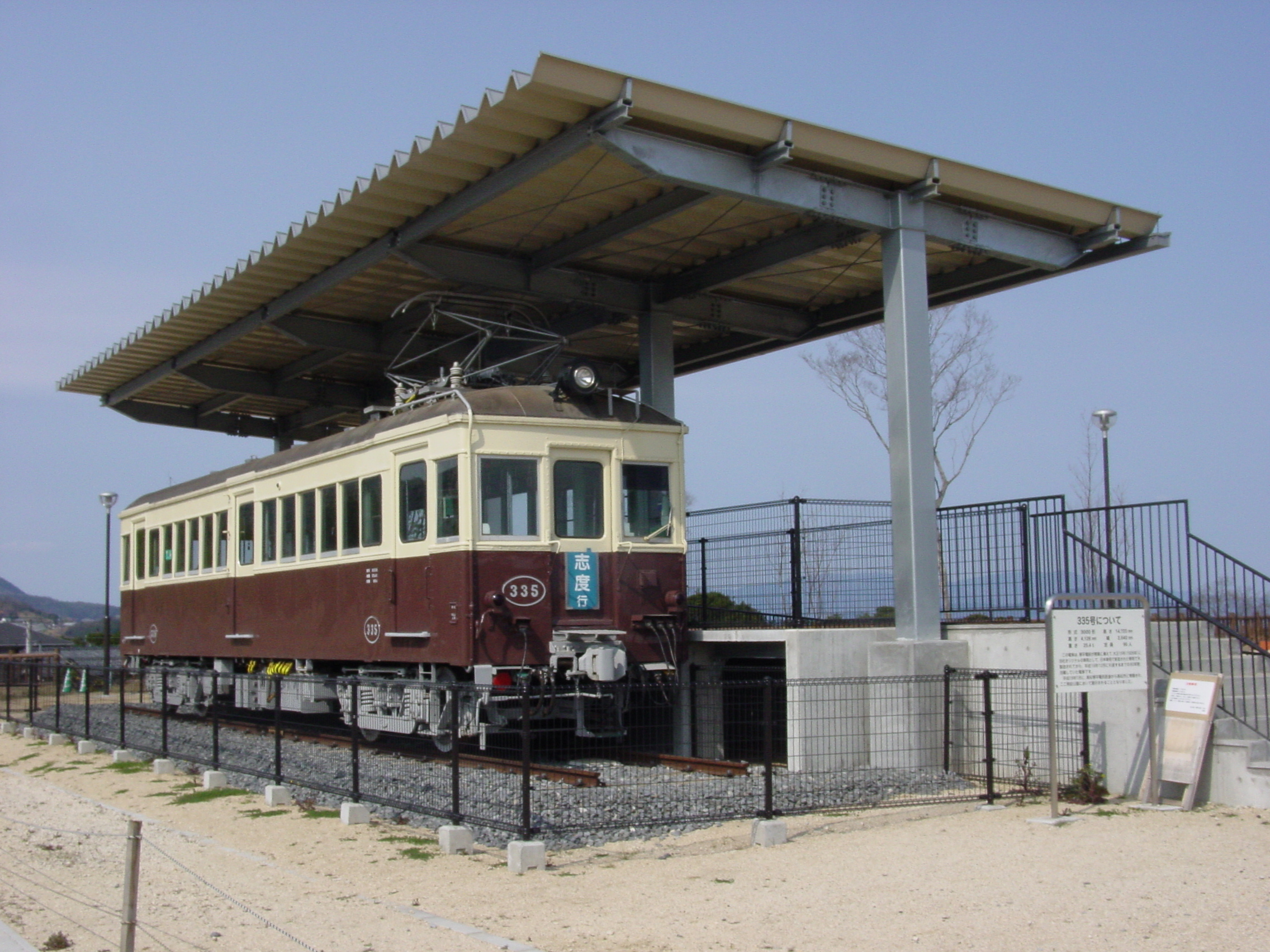 道の駅源平の里むれにて保存されている琴電3000形